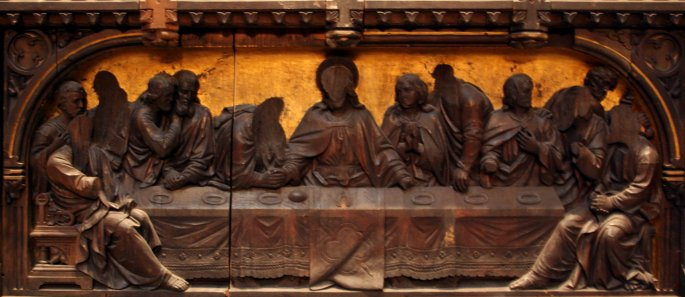 Altarretabel in der Kapelle der Versöhnung. (Foto wurde beschnitten und farbkorrigiert)